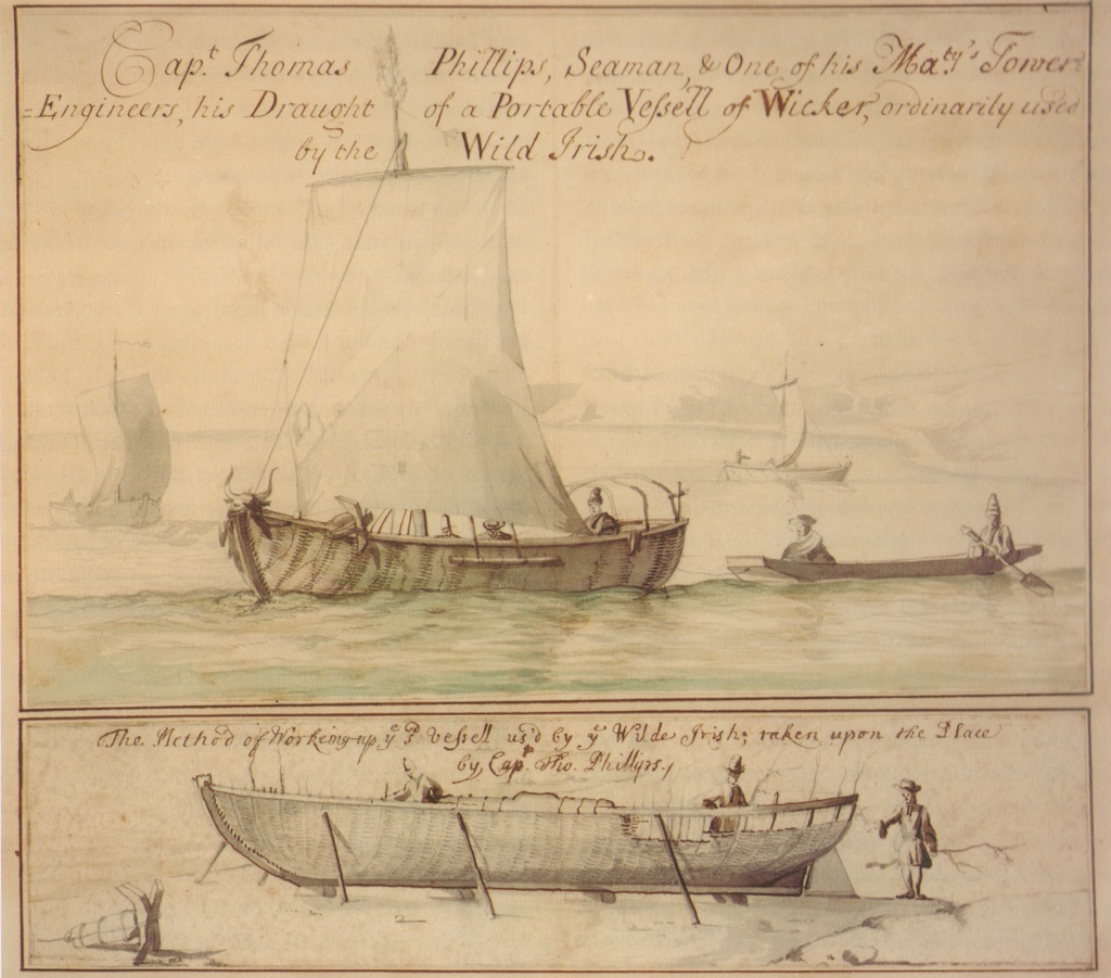 "A portable vessel of wicker ordinarily used by the Wild Irish". Набросок курраха XVII века, сделанный английским капитаном Томасом Филлипсом. Хранится в библиотеке Pepysian Library, бывшей частной коллекции, принадлежащей Колледжу Магдалены в Оксфорде.